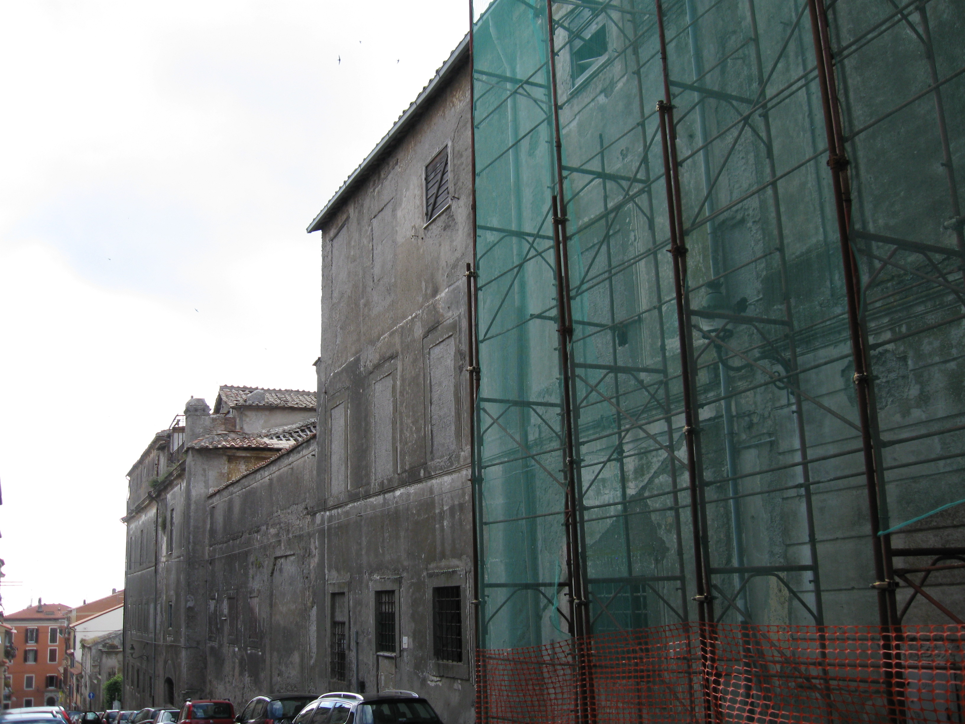 palazzo Pamphilj ad Albano laziale (RM): fianco via san Gaspare del bufalo